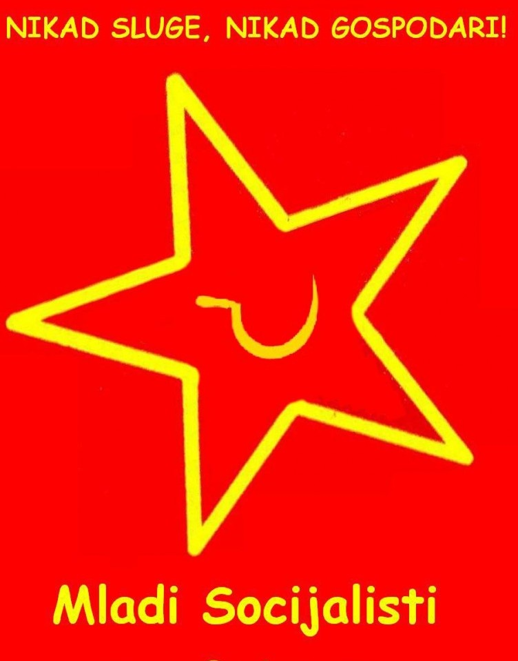 Logo Mladih Socijalista Hrvatske